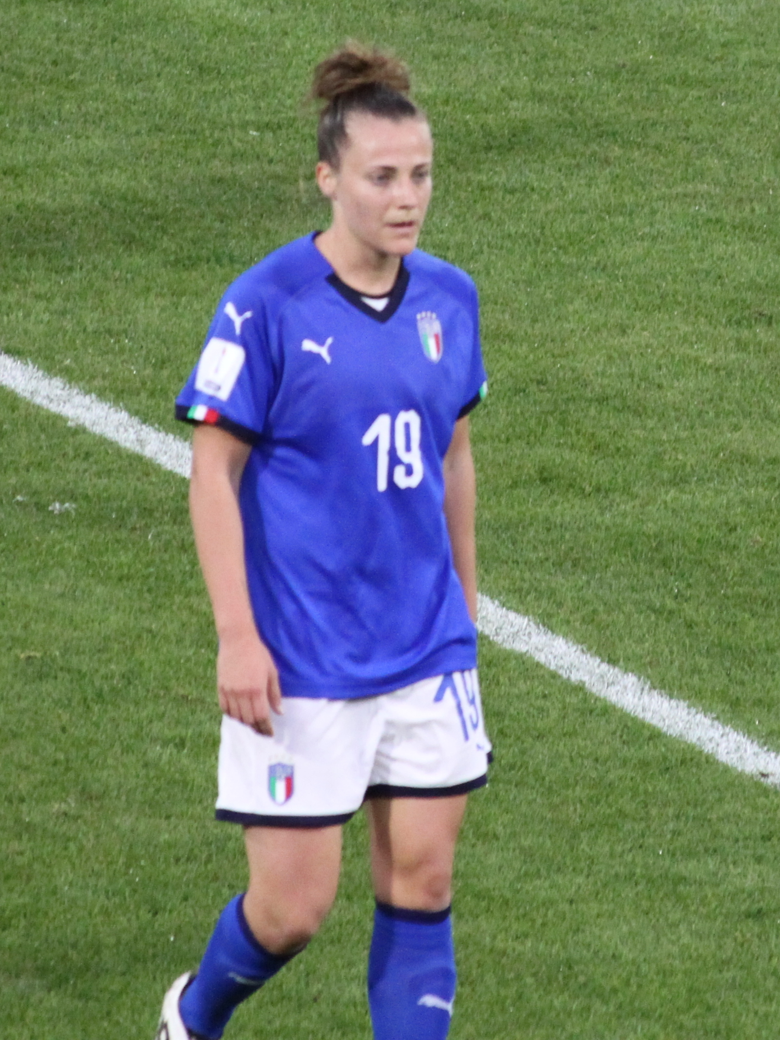 Ferrara, 10 aprile 2018: Italia vs Belgio, qualificazioni al Mondiale di Francia 2019, scatti fine primo tempo. Aurora Galli.